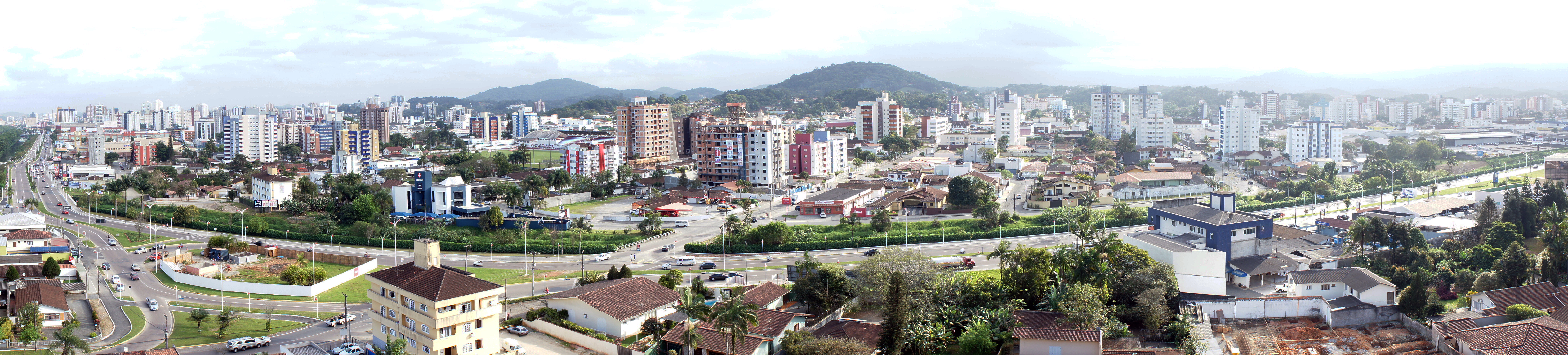 Panorâmica do centro de Joinville e bairro América